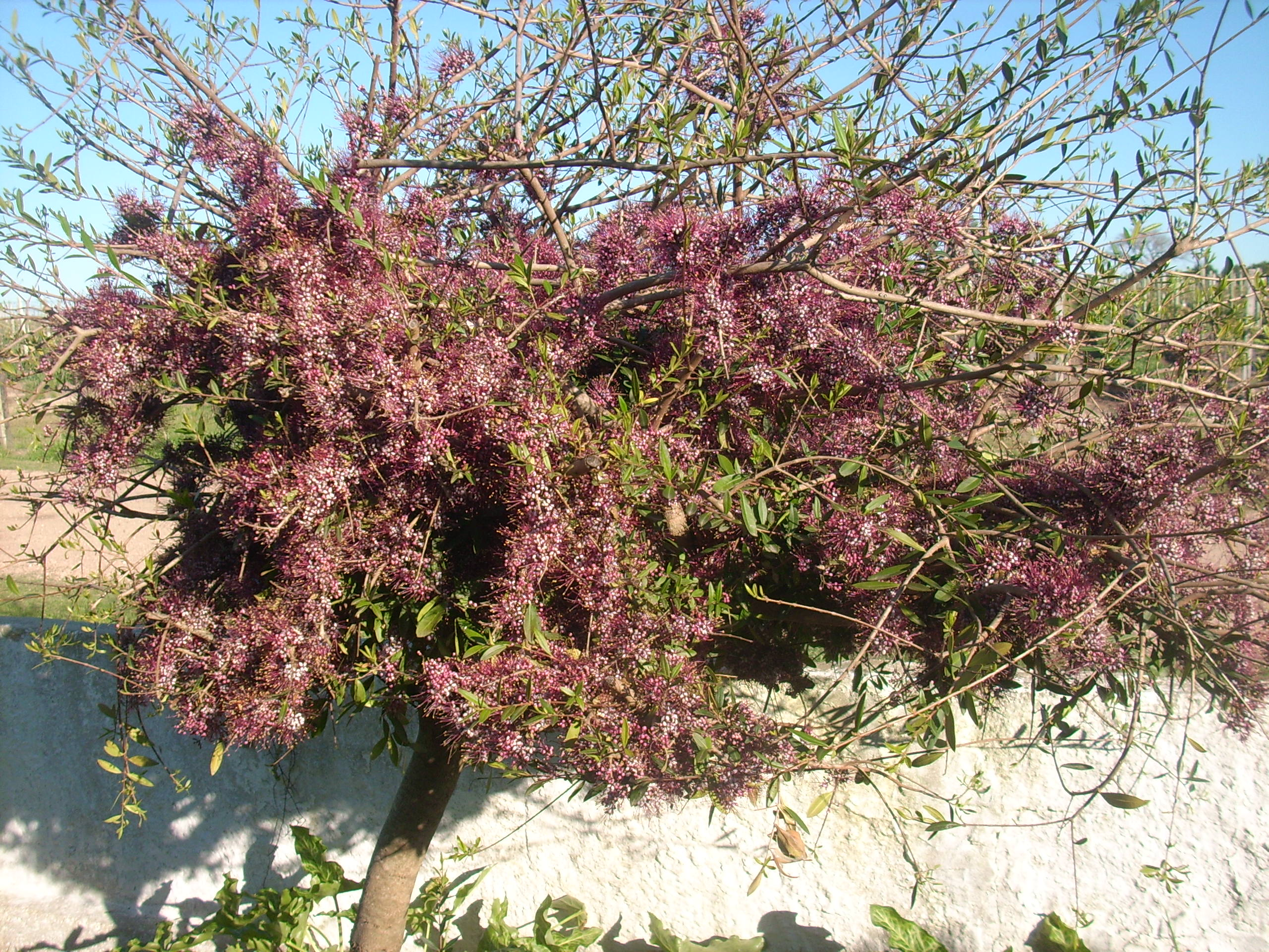 árbol palo de fierro de 8 años de edad